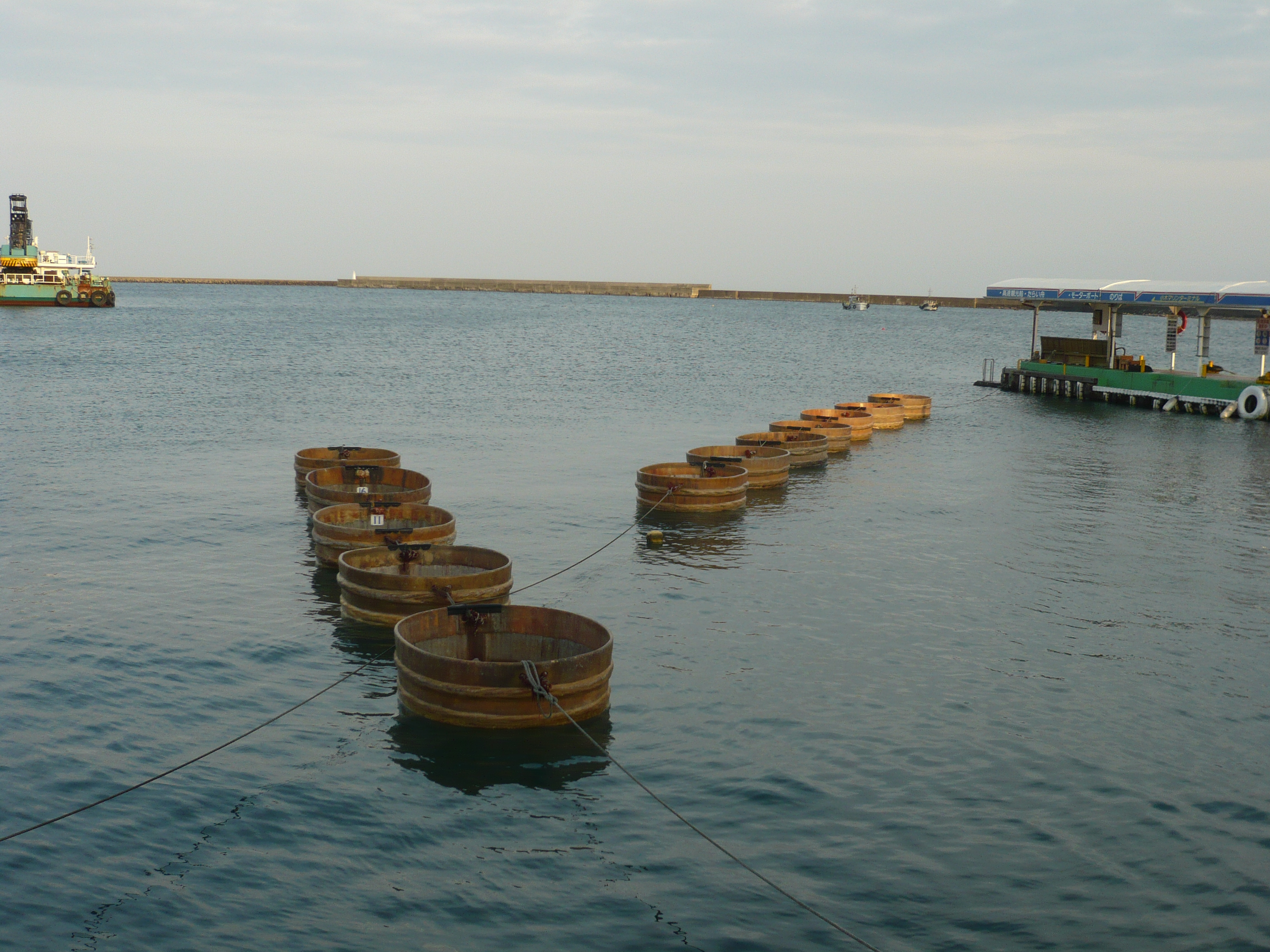 佐渡市小木町、小木港のたらい舟。